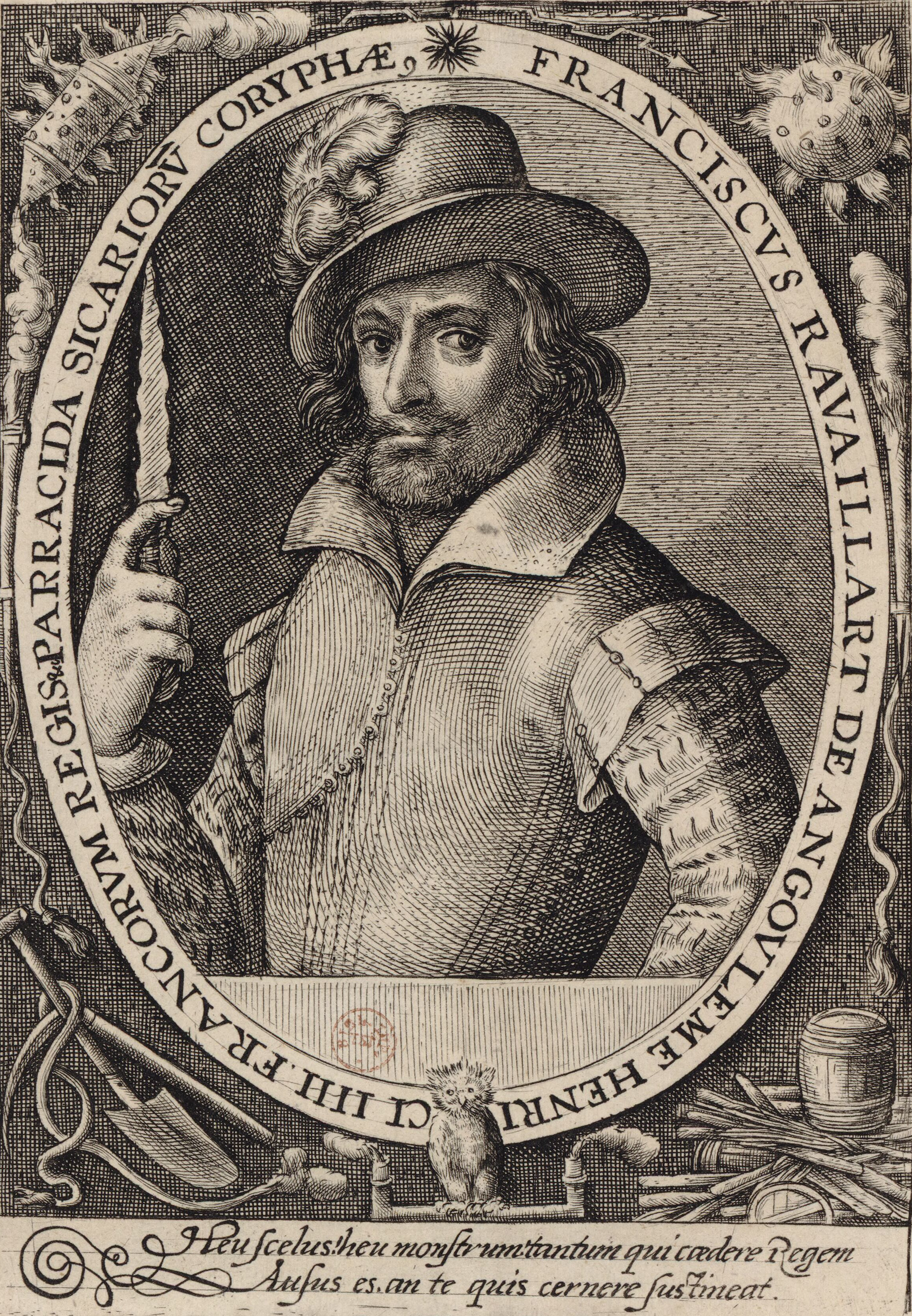 Portrait de François Ravaillac, en buste, de 3/4 dirigé à gauche, dans une bordure ovale sur laquelle on lit : Franciscus Ravaillart de Angoulême Henrici IIII Francorum regis Parracida sicariorum coryphae. Estampe anonyme, gravée par Crispin de Passe.